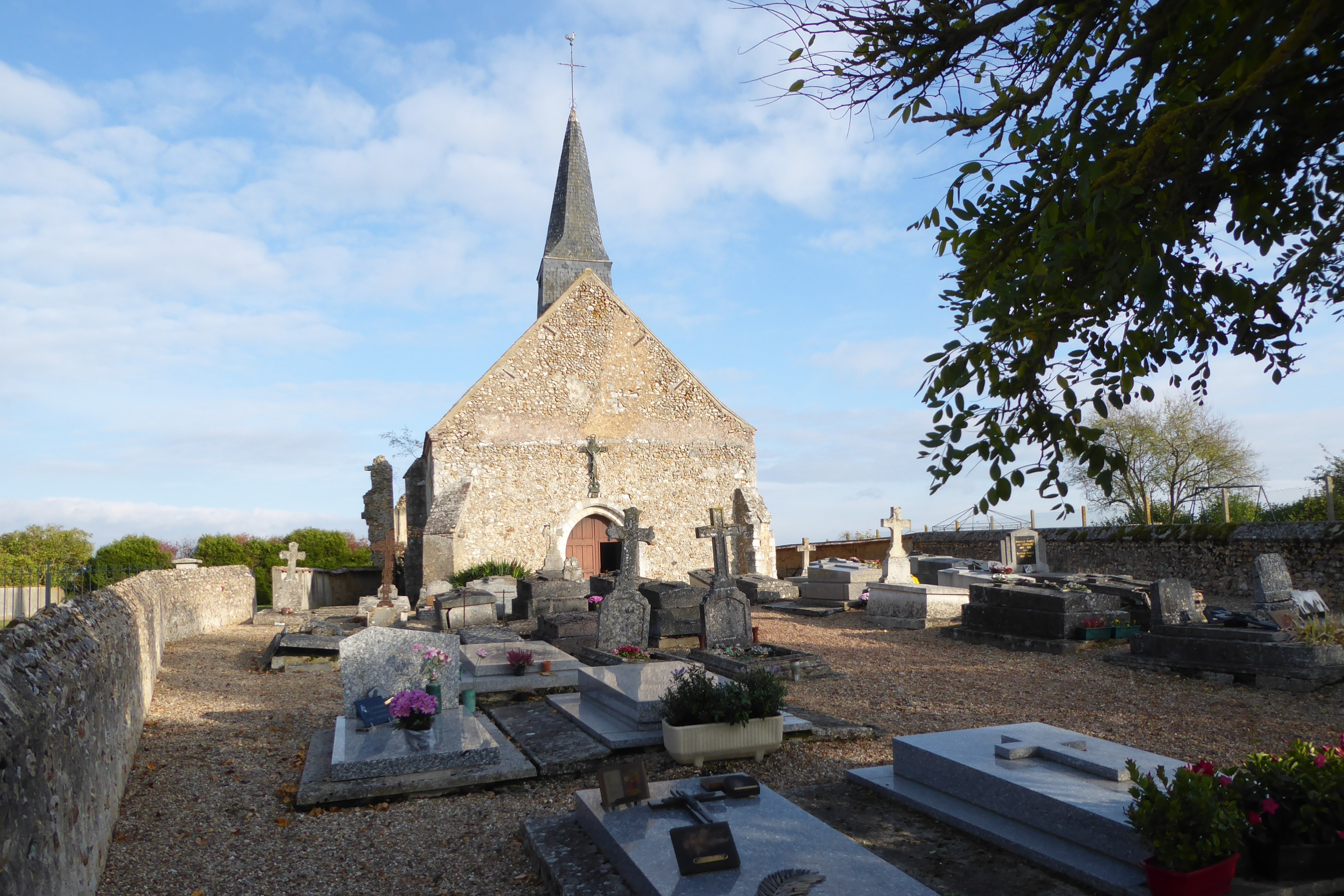 l'église Sainte-Madeleine entourée du cimetière, Puiseux, Eure-et-Loir, France.